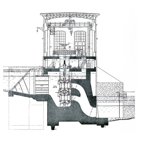 Schnitt durch die Zentrale des Kraftwerks Hagneck im Zustand bei Betreibsaufnahem. Es sind die Maschinensätze mit vier Francis-Turbinen-Räder und Schirmgenerator zu erkenne